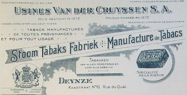 Factuur van tabaksbedrijf van der Cruyssen - Deinze - Oost-Vlaanderen - België